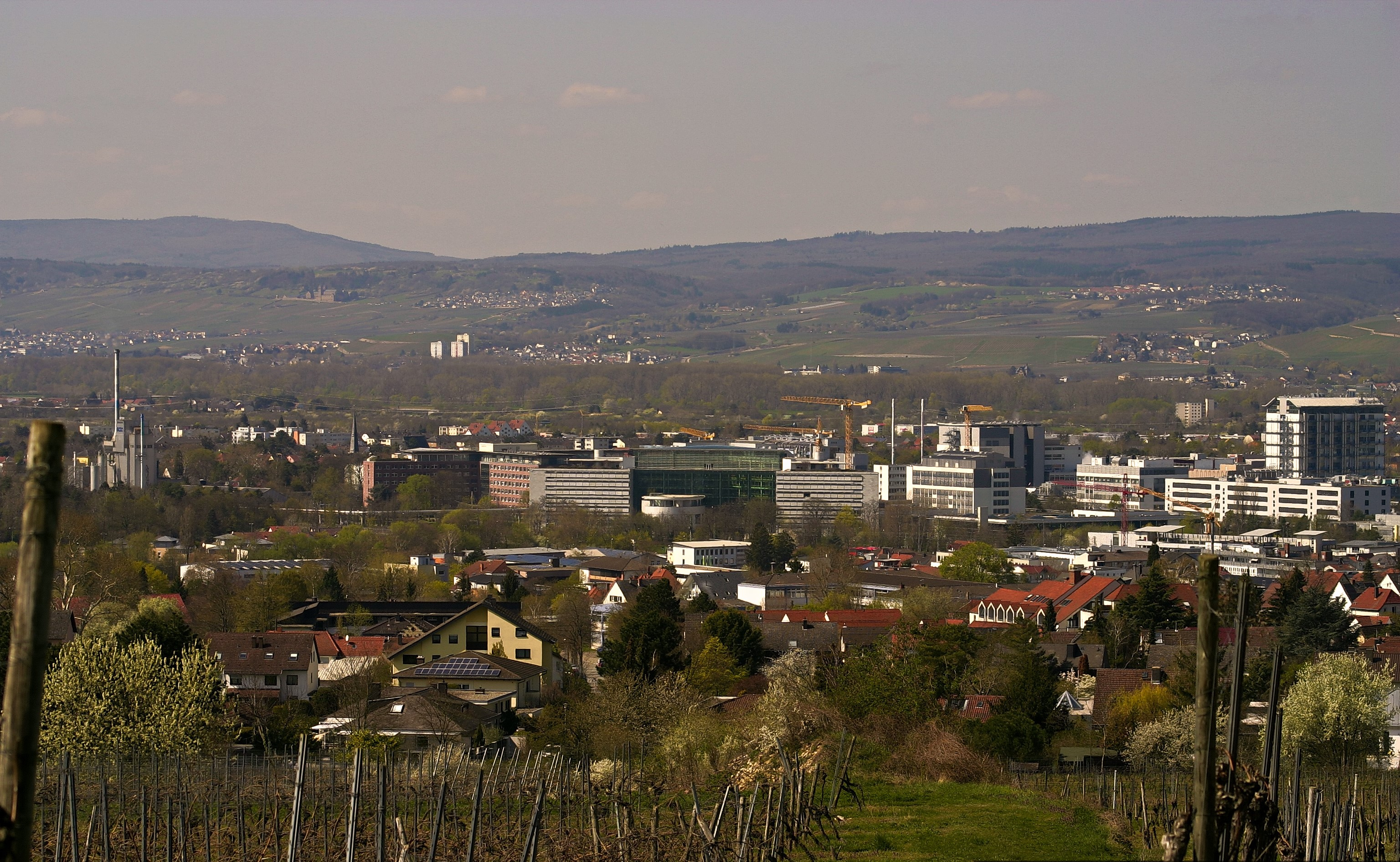 Werksgelände von Boehringer in Ingelheim, aus Südosten, im April 2019.